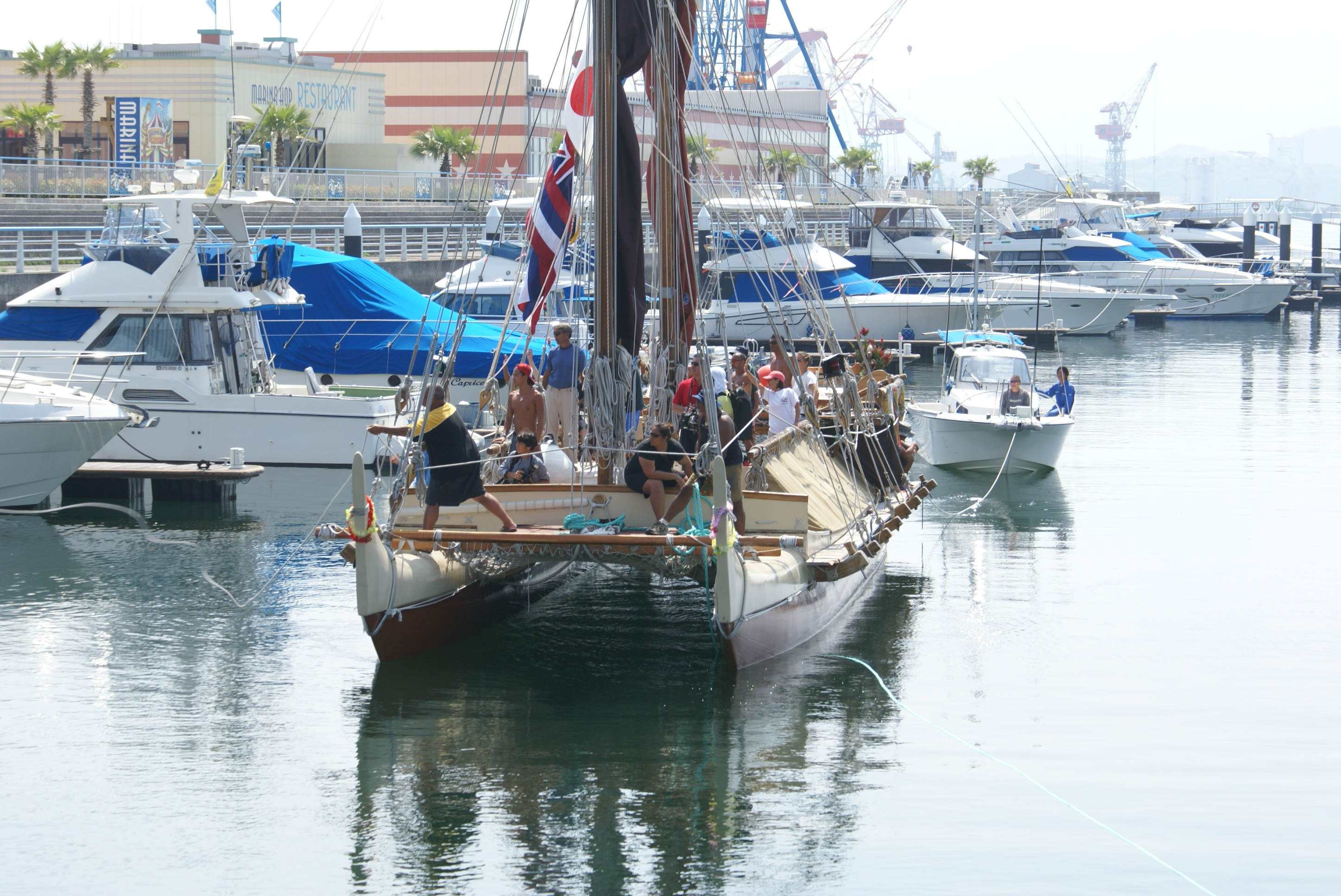 Hokule'a enters Kan-non Marina, Hiroshima